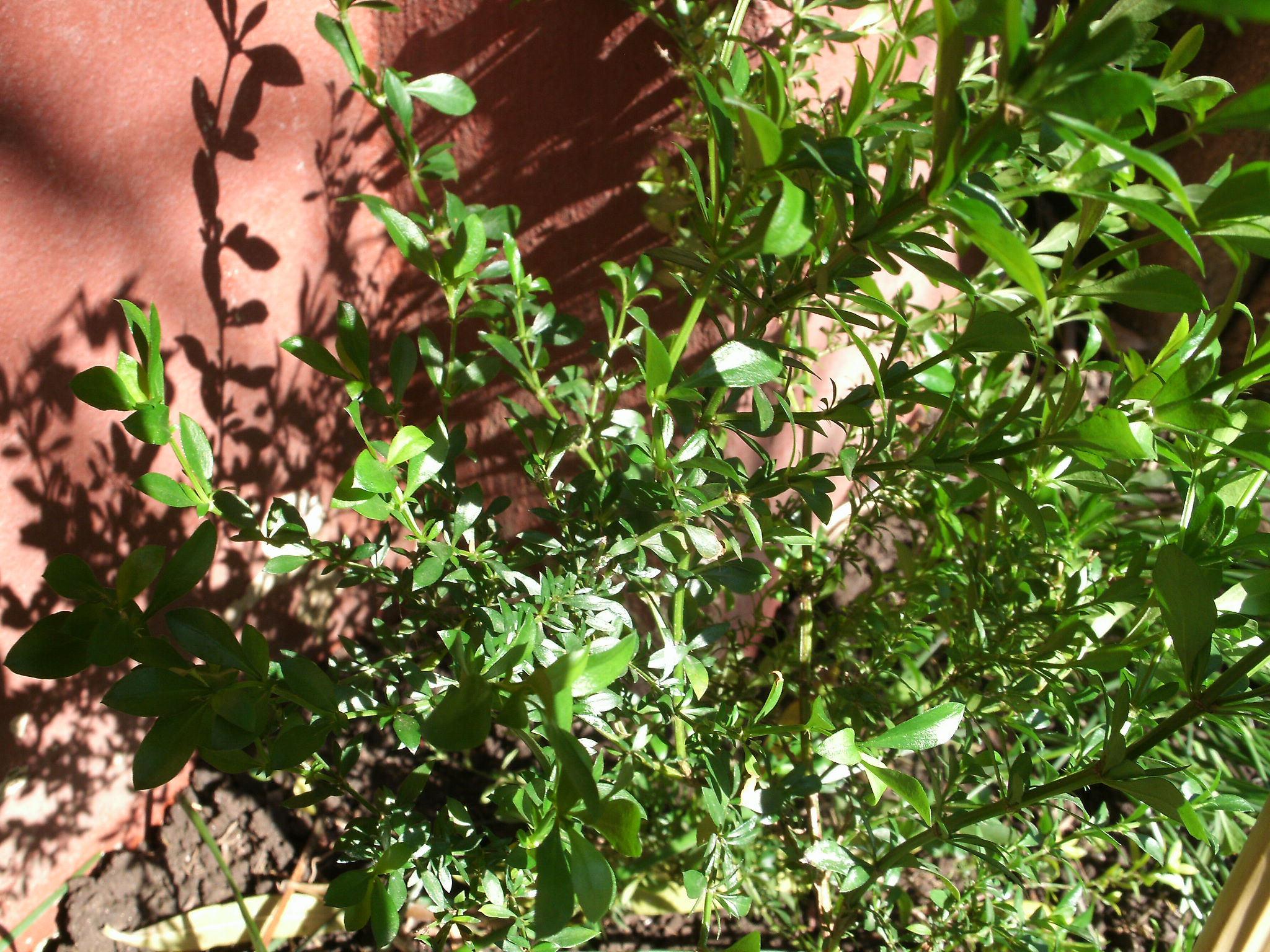 Jardín residencial, planta nativa rioplatense; cantero con mucha humedad, media sombra